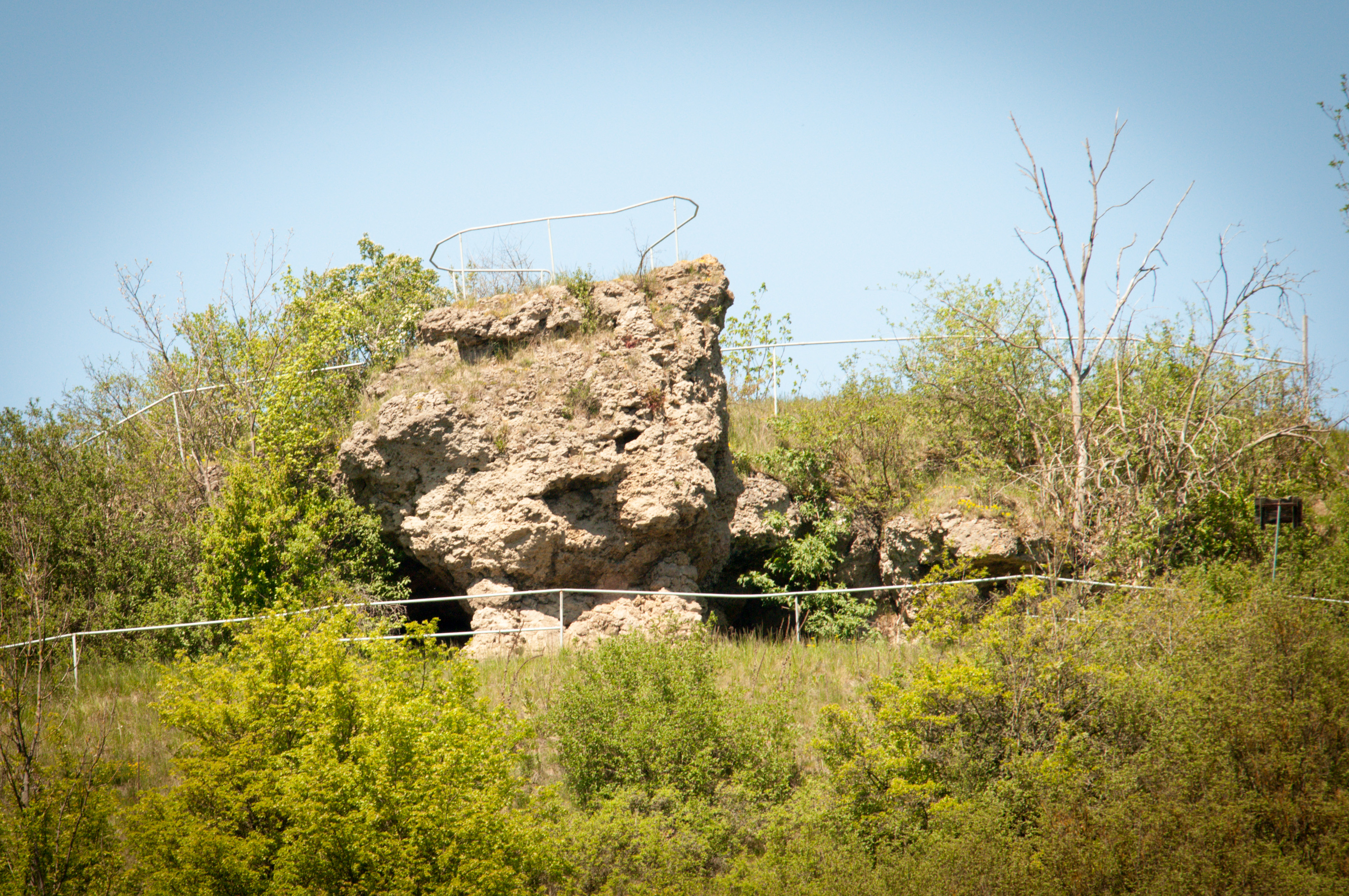 FFH-Gebiet Östliches Riffgebiet Orlatal : der Totenstein über dem Mühlengrund